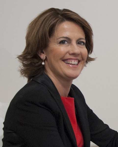 Encuentro del Lehendakari con la Presidenta de Navarra